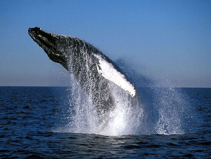 puerto cayo cumbre de las ballenas jorobadas; Humpback whale (Megaptera novaeangliae)